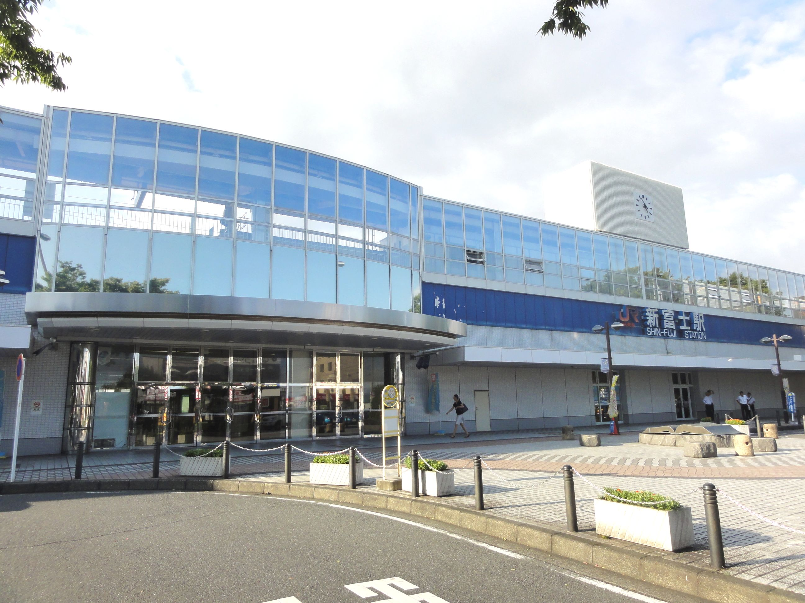 新富士駅南口